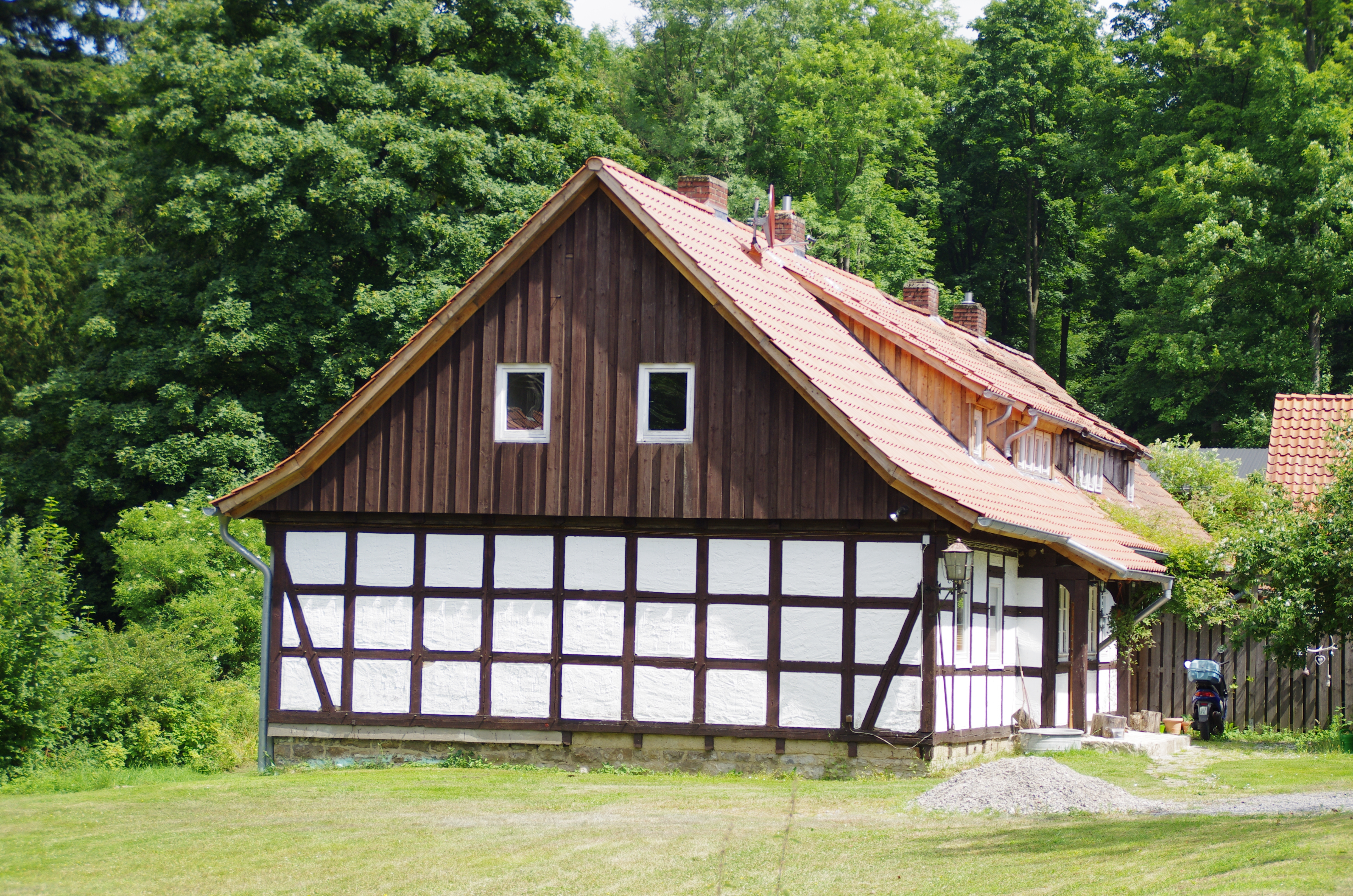 Springe in Niedersachsen. Die Waldarbeiterhäuser am Forsthaus stehen unter Denkmalschutz.